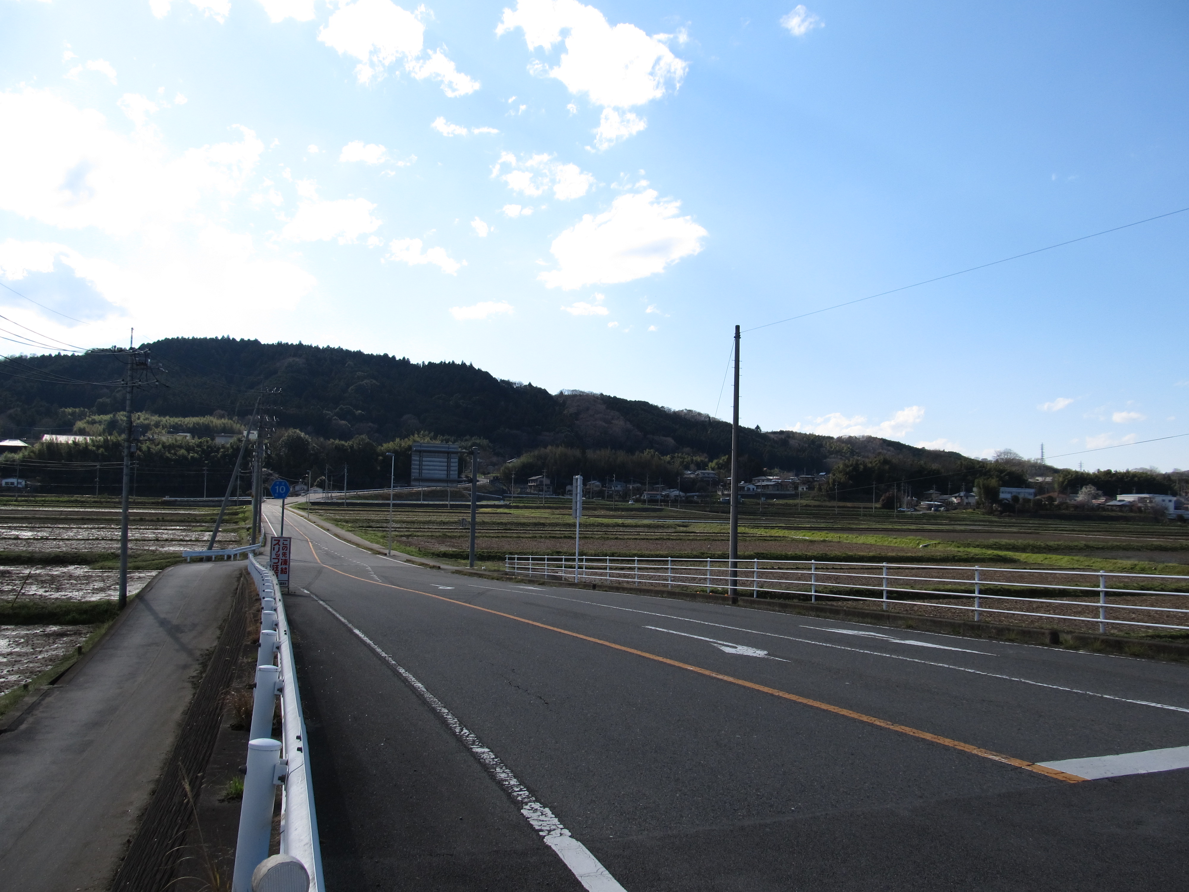 栃木県道10号宇都宮那須烏山線の終点（興野大橋西交差点）から西方向を見て撮影。